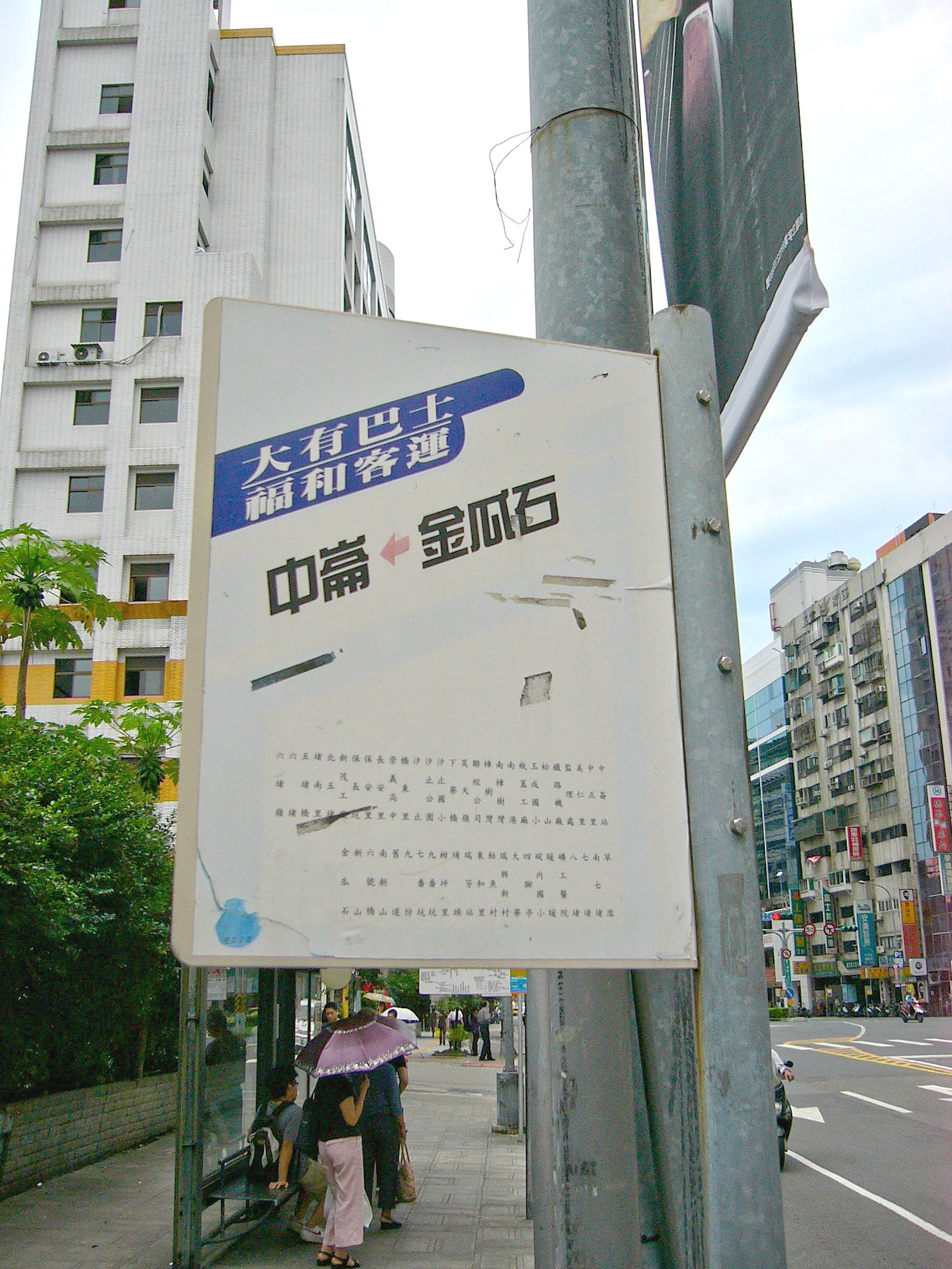 臺北市松山區長安東路二段，臺北市立圖書館中崙分館（左後）旁，大有巴士與福和客運聯名站牌。